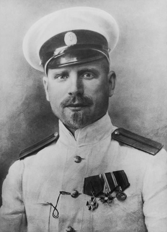 Седов Георгий Яковлевич (1877-1914), полярный капитан. Поход Георгия Седова на «Св. мученике Фоке» к Северному полюсу в 1912 году – одна из самых волнующих и героических страниц в многовековой истории освоения АрктикиИсточник: Личное собрание С. Бурасовского